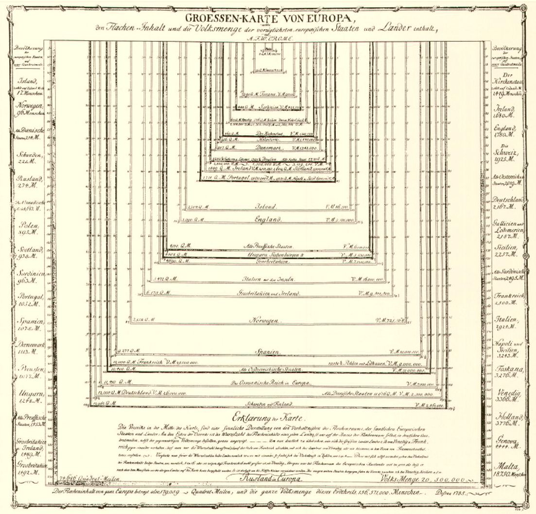 Groessen Karte von Europa, 1785